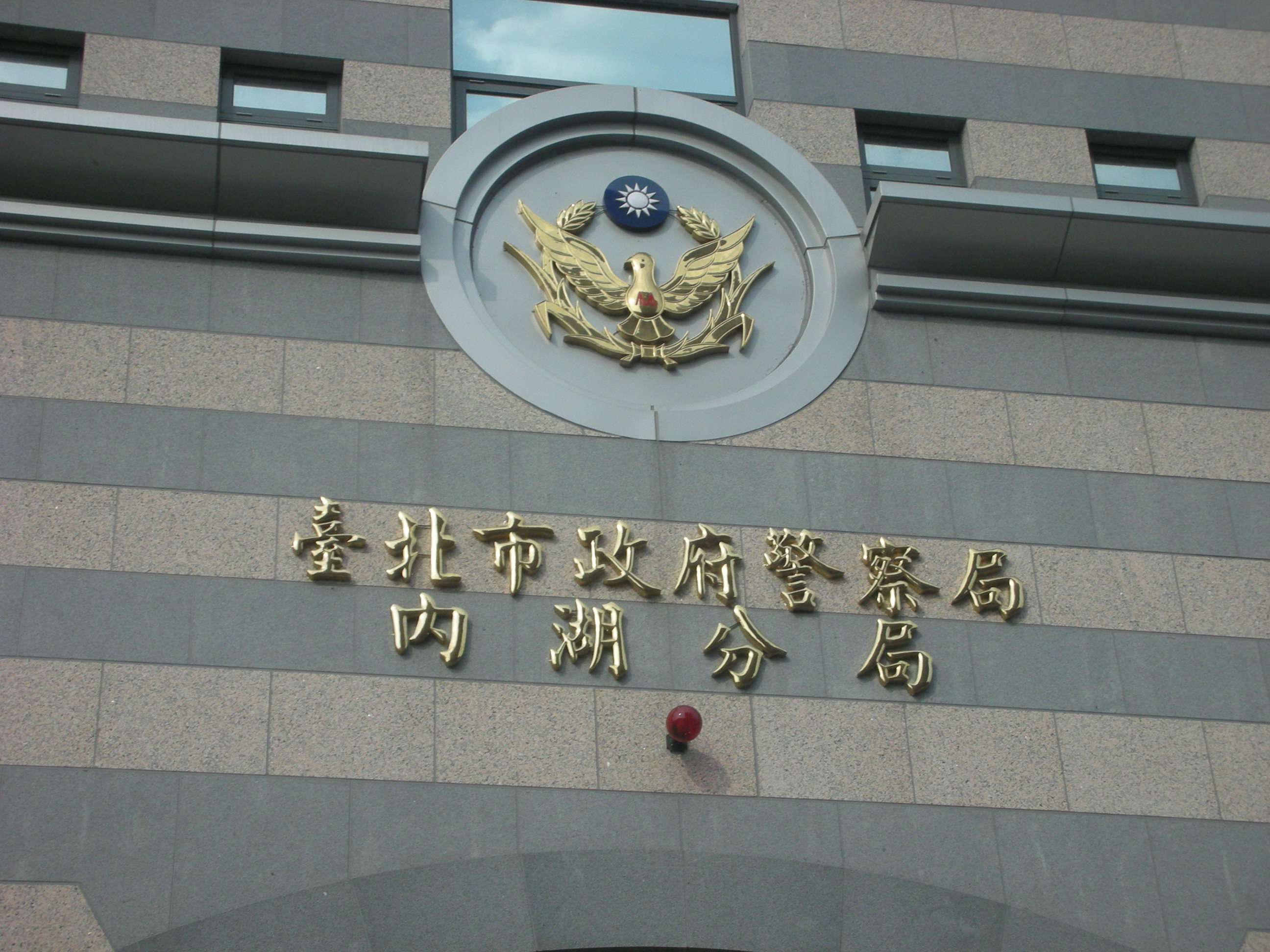 臺北市政府警察局內湖分局。